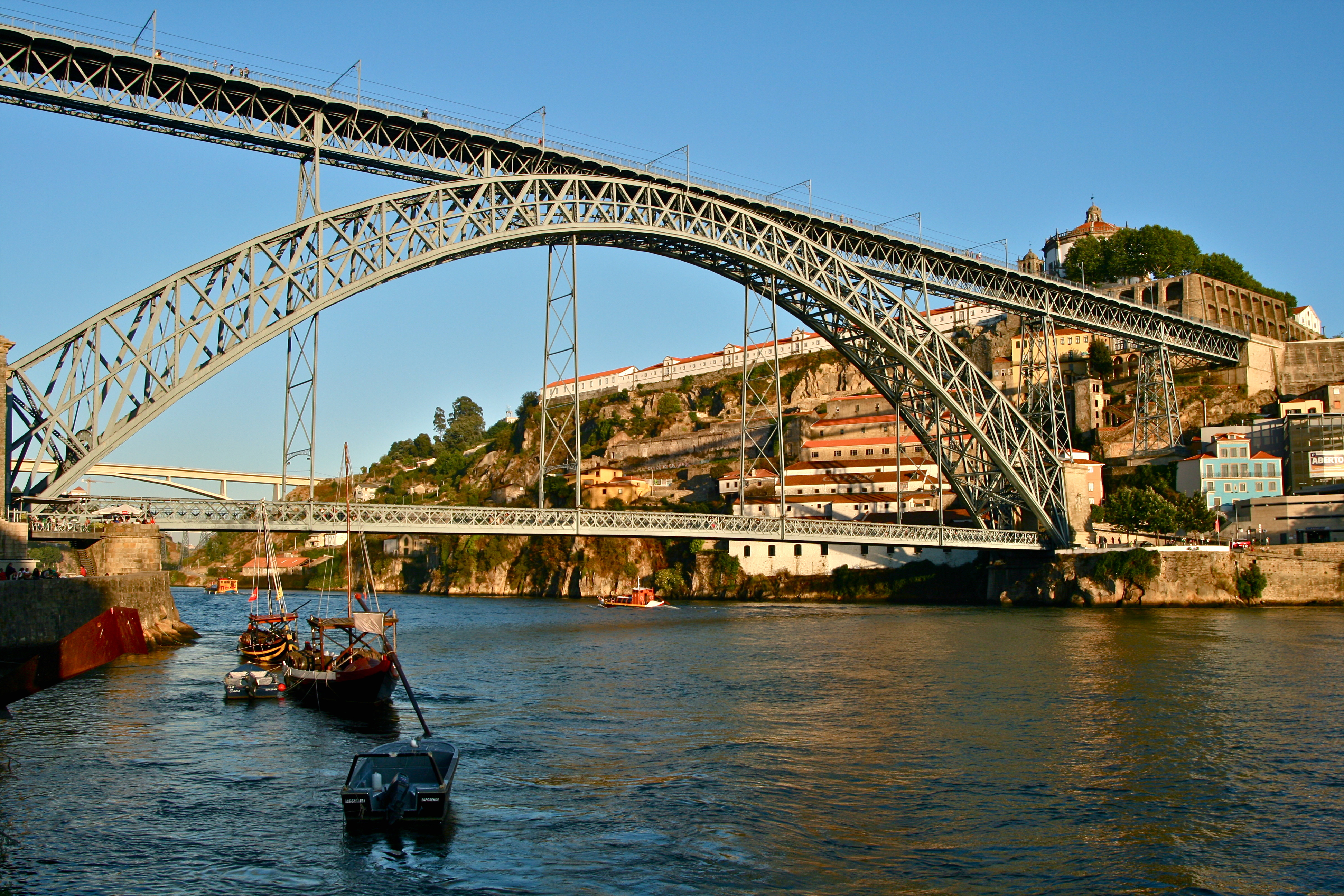 Dom Luís Bridge, Porto